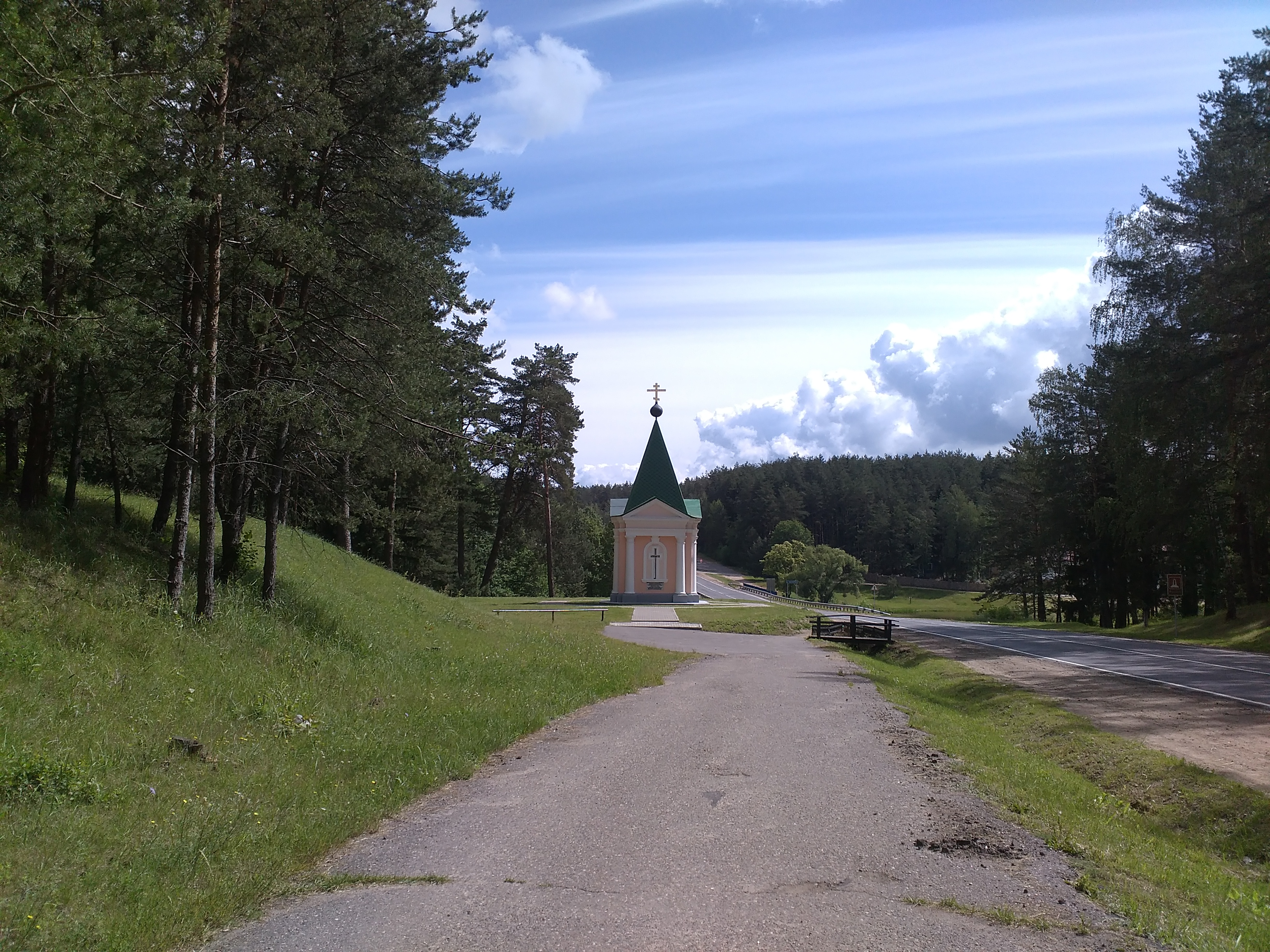 Мемориальная часовня в память об Отечественной войне 1812 года (построена в 1912 году)